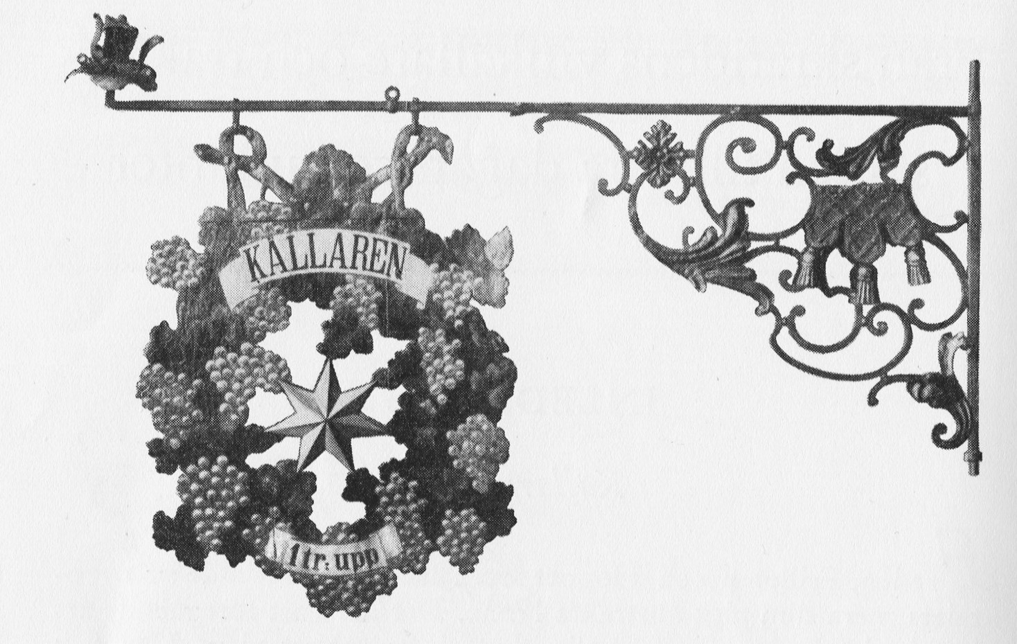 Skylten för Källaren Stjärnan, Österlånggatan 45. "Skylt, järn, målad. 1700-talets mitt [med blyerts]. Målad järnplåt, förgylld stjärna. Tillhört källaren Stjärnan, Österlånggatan 45. [Senare tillagt:] För 'gårköket' (enklare matställe) Stjärnan som 1605- 1762 hade sina lokaler i Österlånggatan 47, därefter Österlånggatan 45. Skylten och armen kan ha tillkommit vid flyttningen 1762. B=0"